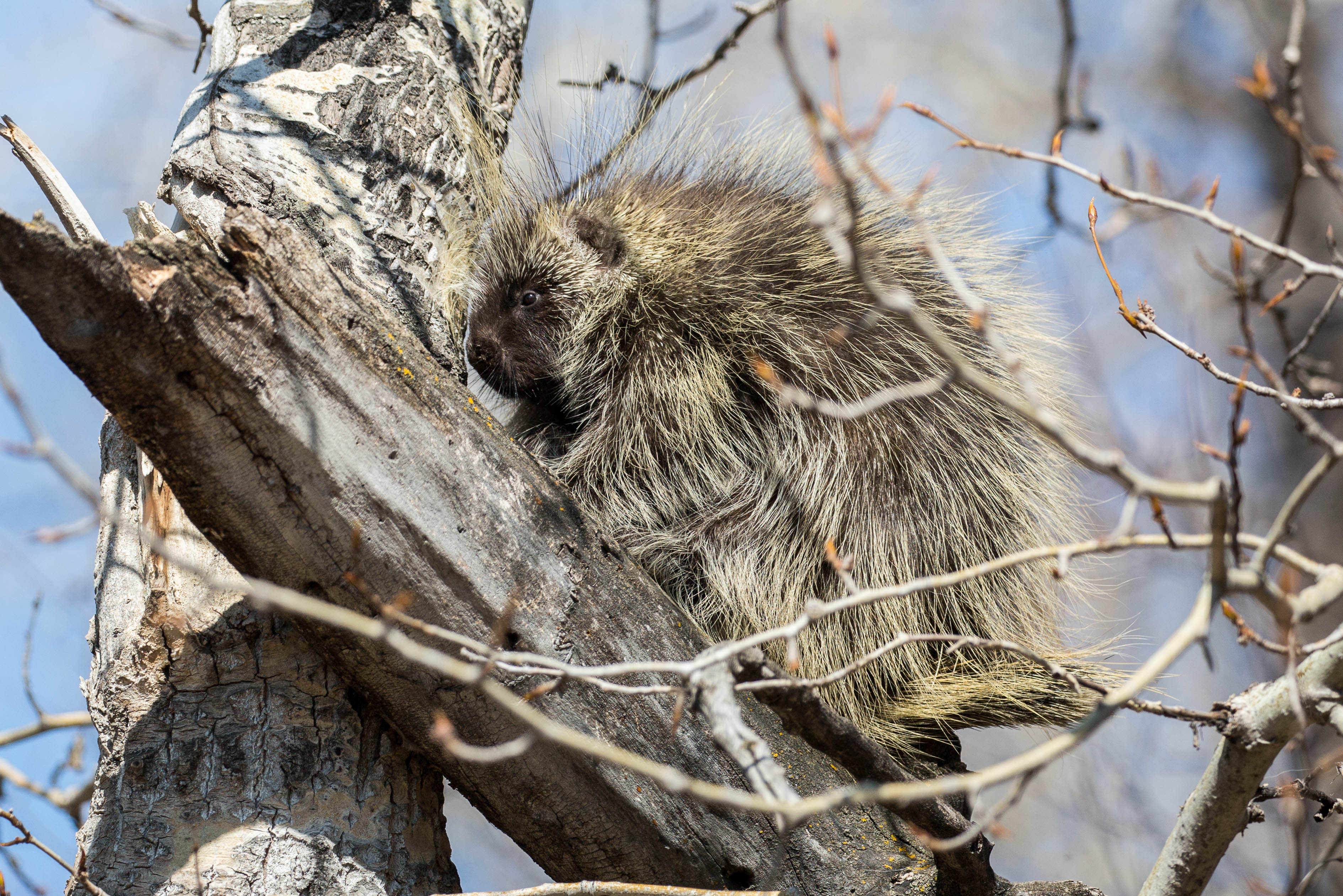 IMG_9922-130.jpg